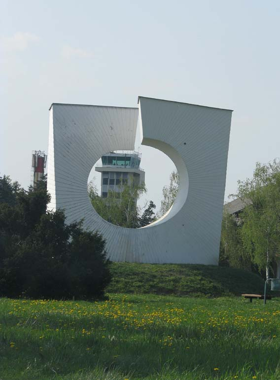 Spomenik u Plesu, Velika Gorica